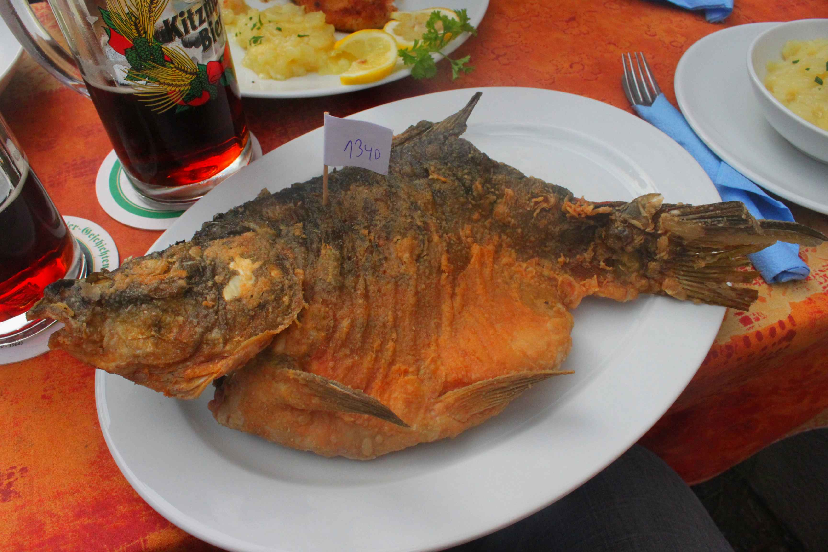 Im Bierteig ausgebackener Spiegelkarpfen mit Preisschild, Preis nach Gewicht